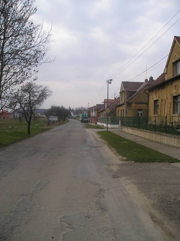 osada Krahulov